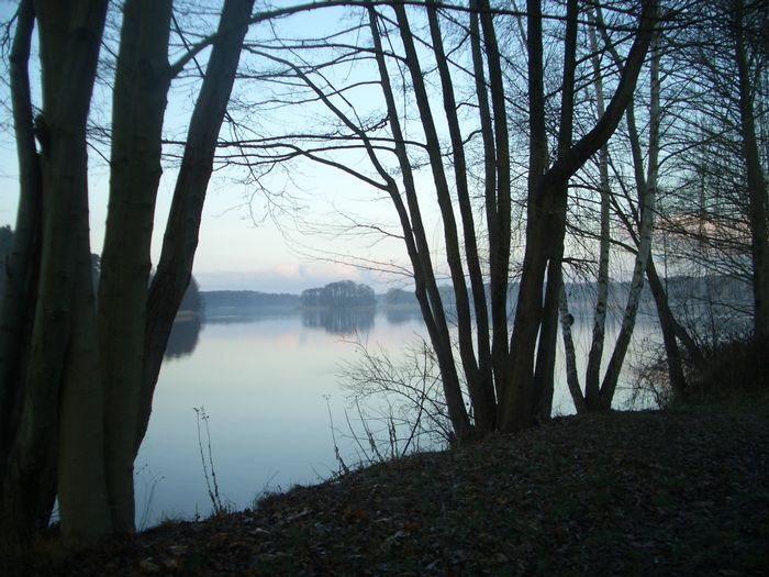 Foto met uitdrukkelijke toestemming van de maker, die een goede vriend van mij is